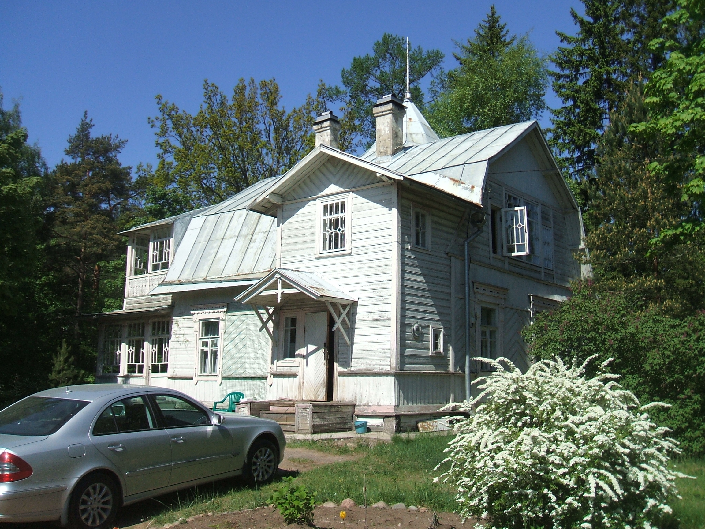 Жилой дом усадьбы Тихий берег